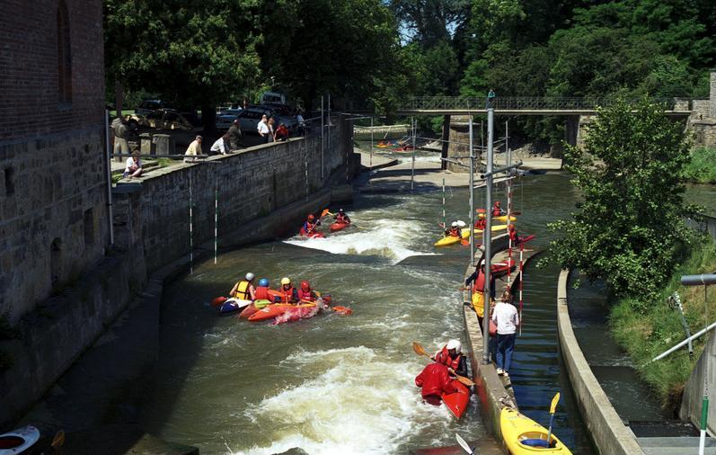 Juni 1988, Hildesheim, Kajaktraining auf der Innerste.